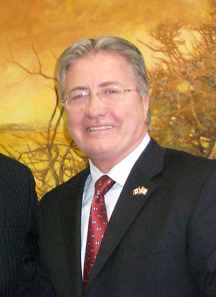 Ge digital camera